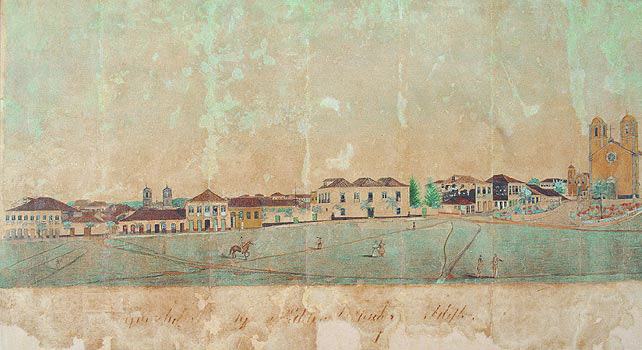 VISTA DO DESTERRO, ATUAL FLORIANÓPOLIS, Aquarela sobre papel - 36,4 x 61,8 cm